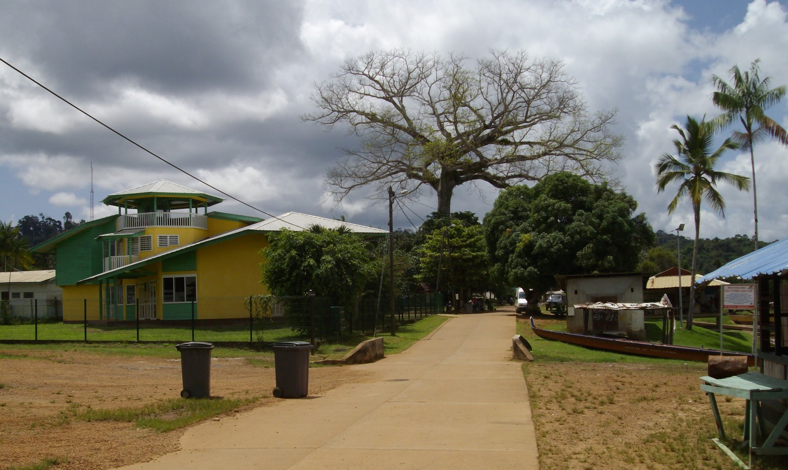 Vue de la place de la poste au centre de Papaichton.